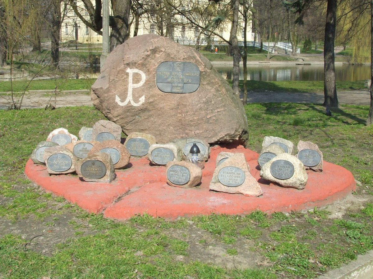 Mińsk Mazowiecki, pomnik w parku